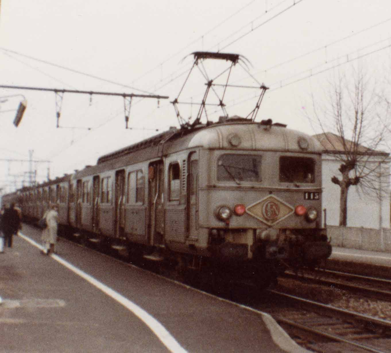 Z 5115 en UM à Montereau en janvier 1981. Cette automotrice a déjà passé sa GRG il y un moment. À noter la présence des feux rouges normalisés mis en place lors de cette révision.